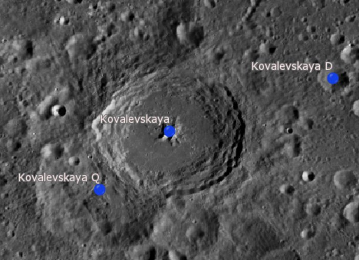 Cráter lunar Kovalevskaya. Cráteres satélite. (Imagen LRO)